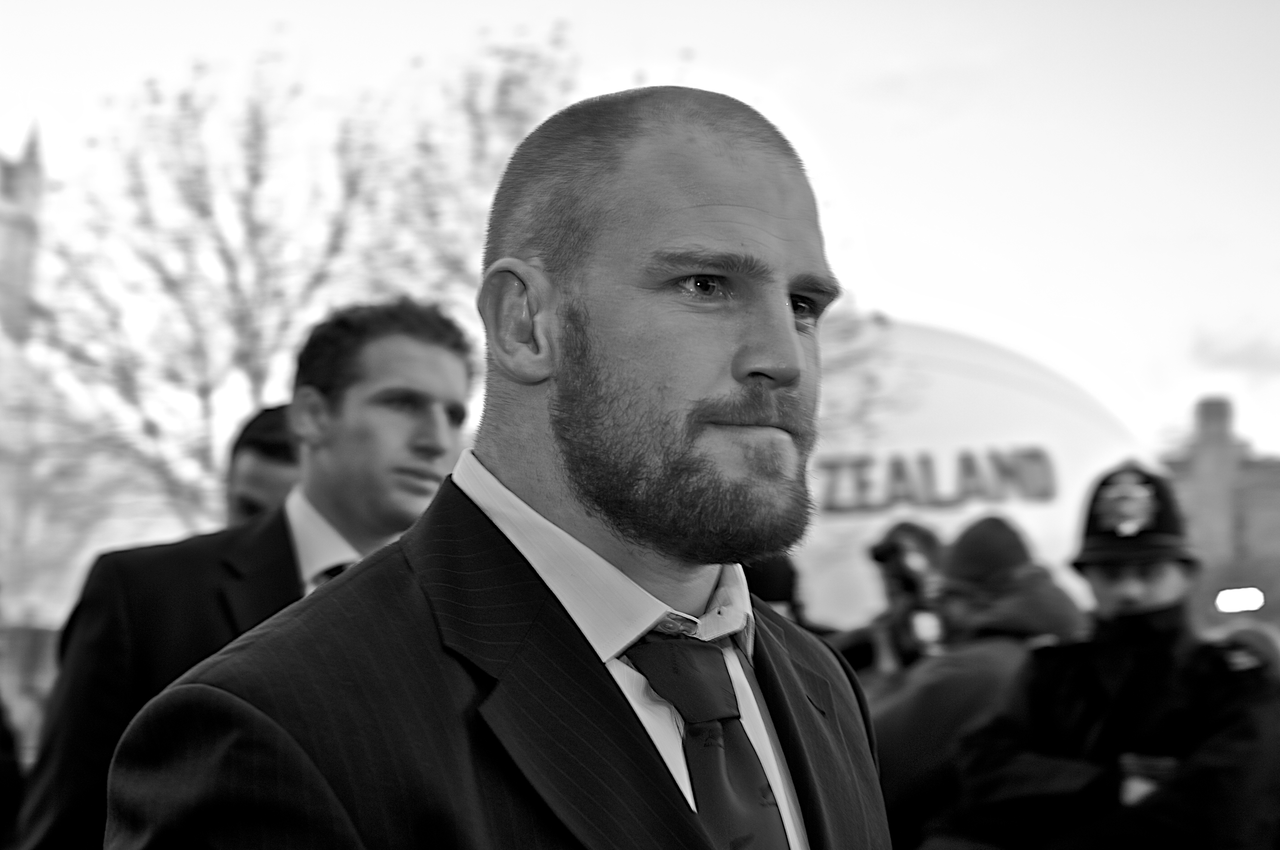 All Blacks